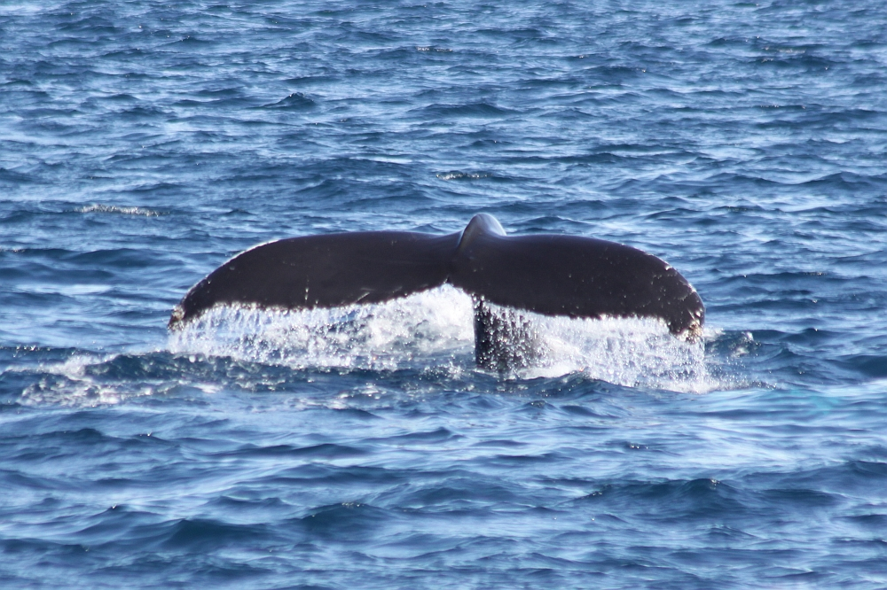 Buckelwal vor der Küste Grönlands